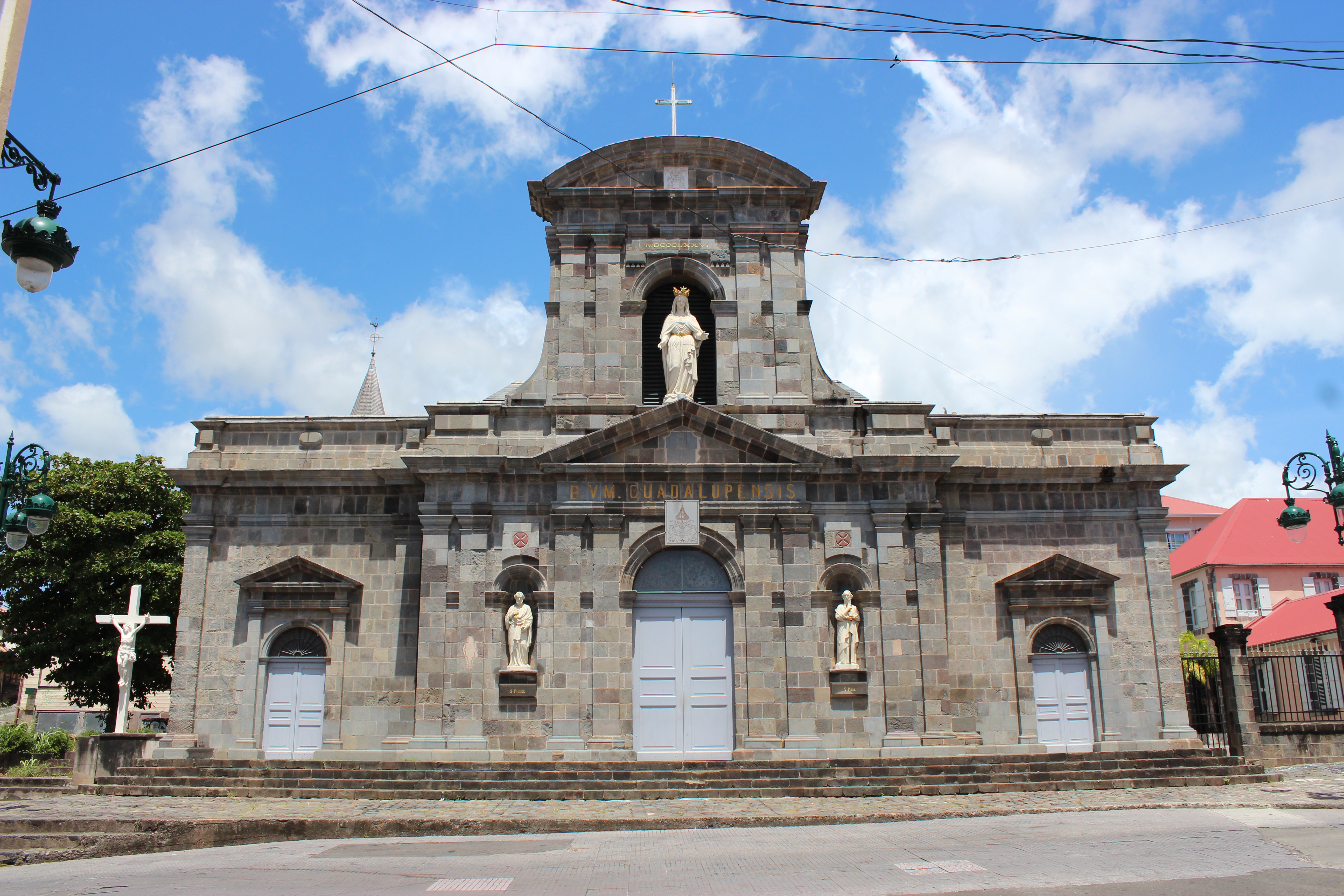 Cathédrale Notre-Dame-de-Guadeloupe (ClasséInscritClassé) .